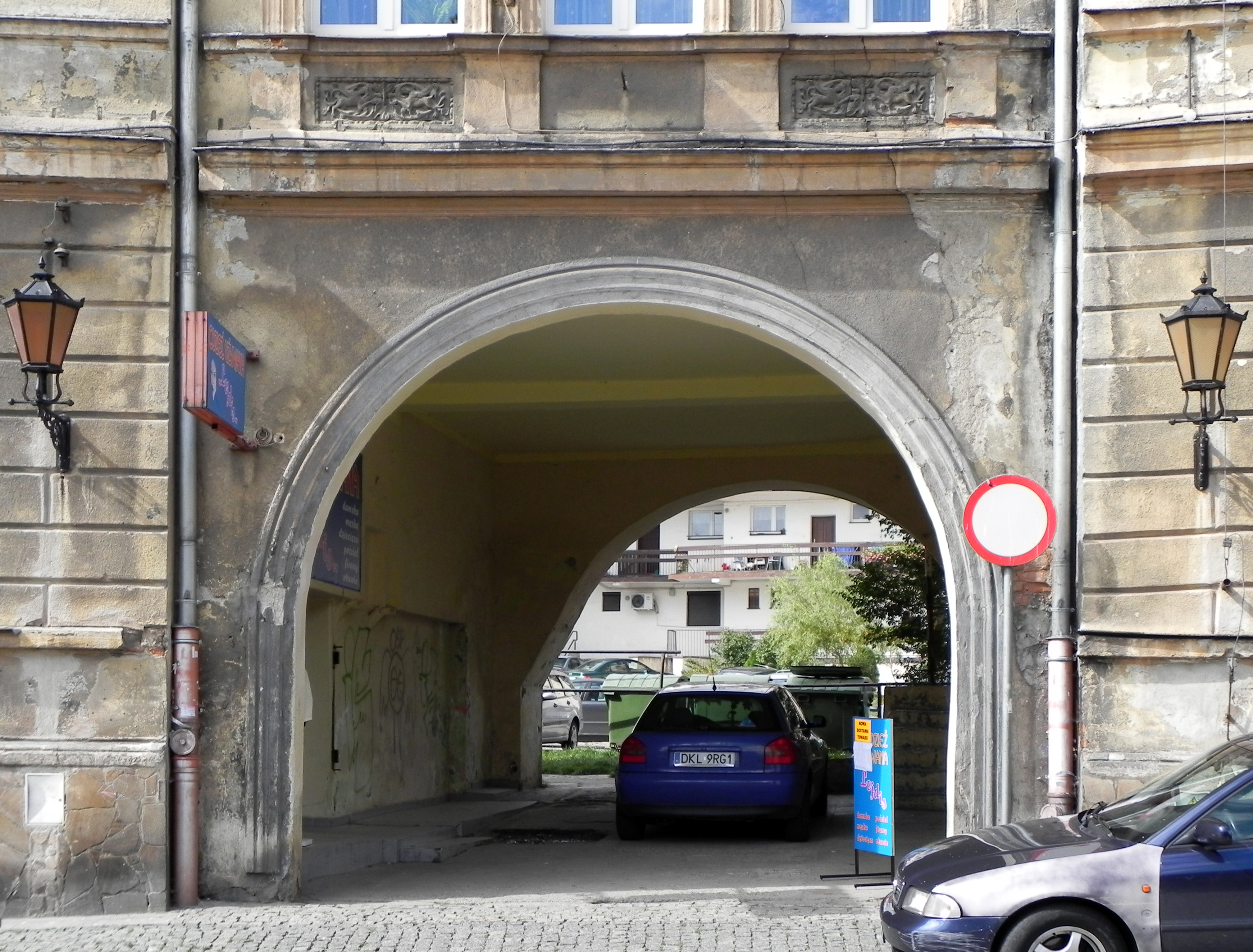 Kłodzko, browar, ob. budynek mieszkalno-usługowy, 1869-1870